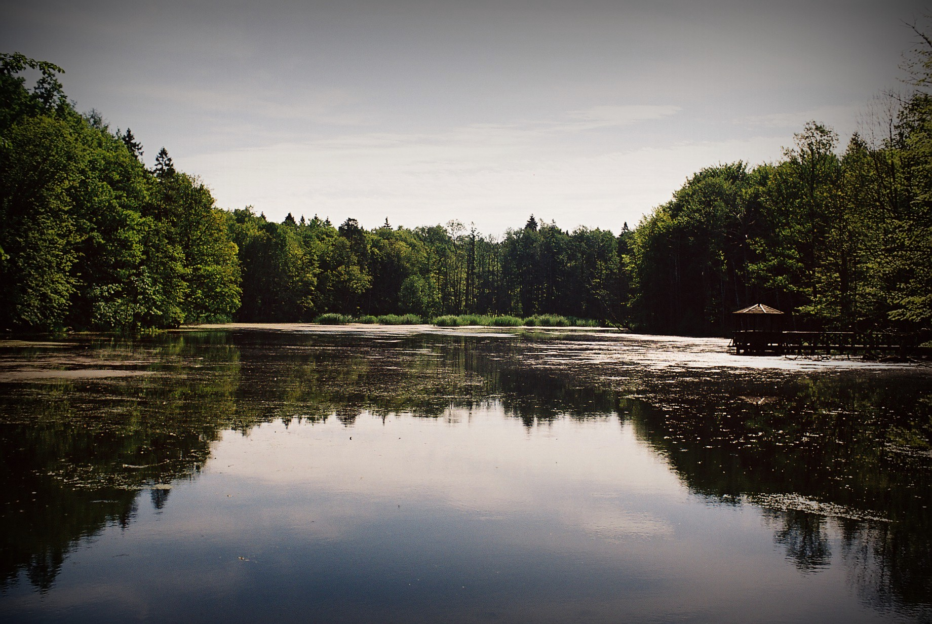 Autor: Adrian Grzegorz Rok utworzenia: 2005